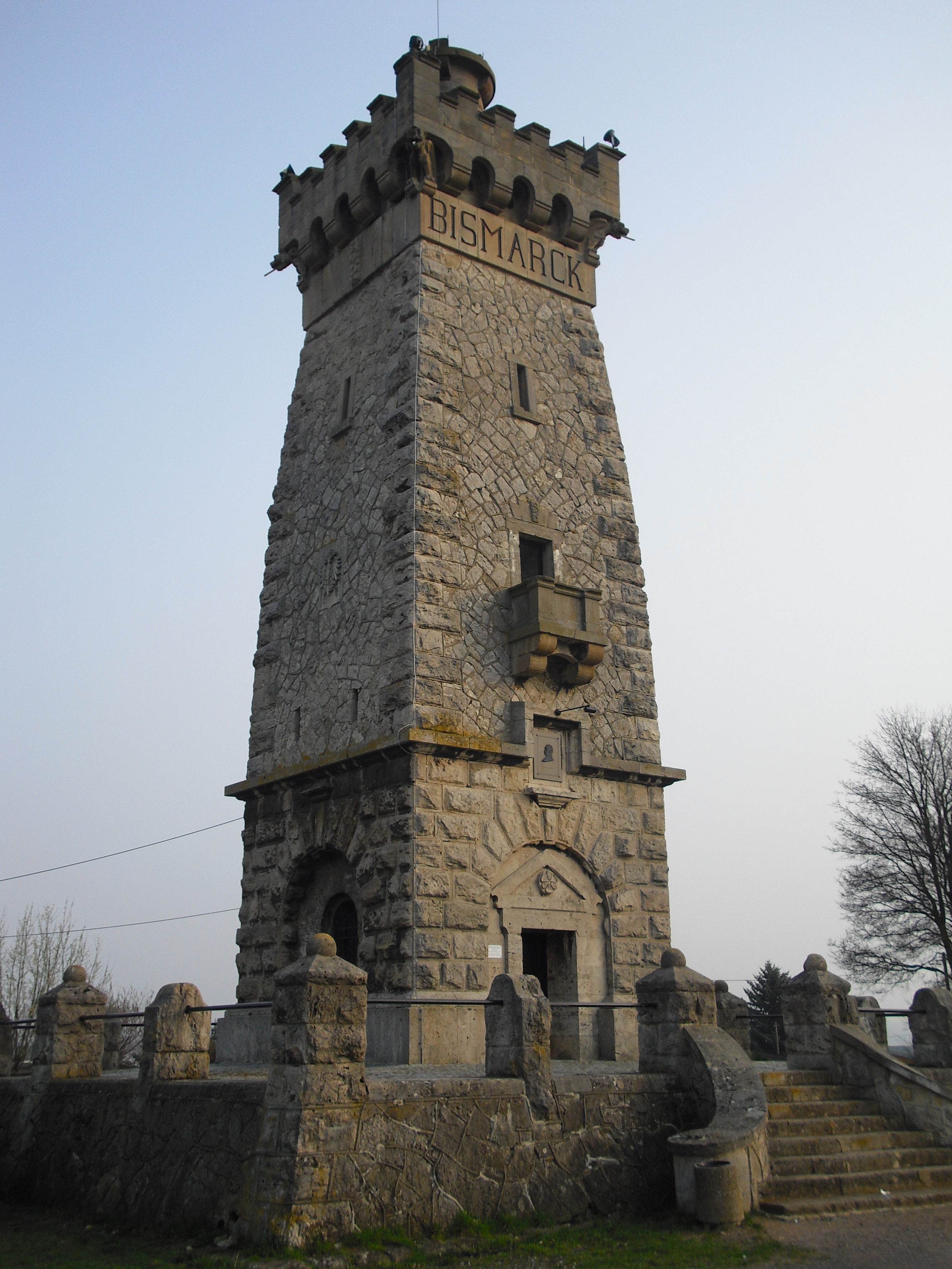 Bismarckturm Apolda